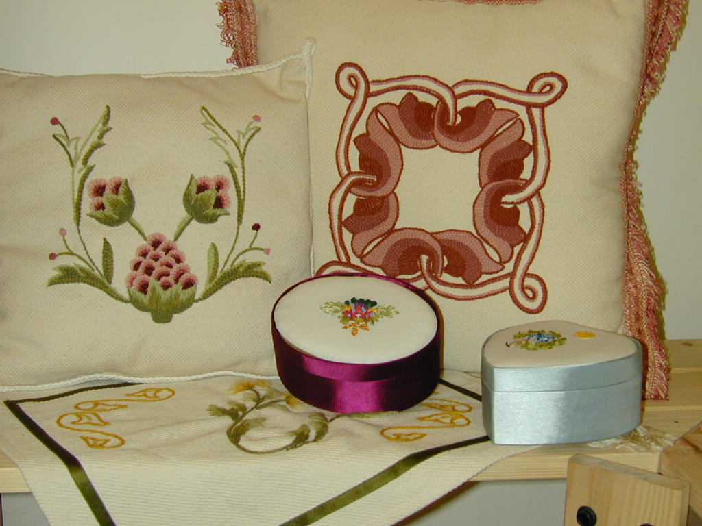 foto mia personale, cuscini ricamati a Bandera su Tela Bandera Licensing Categoria:Immagini sulla tessitura